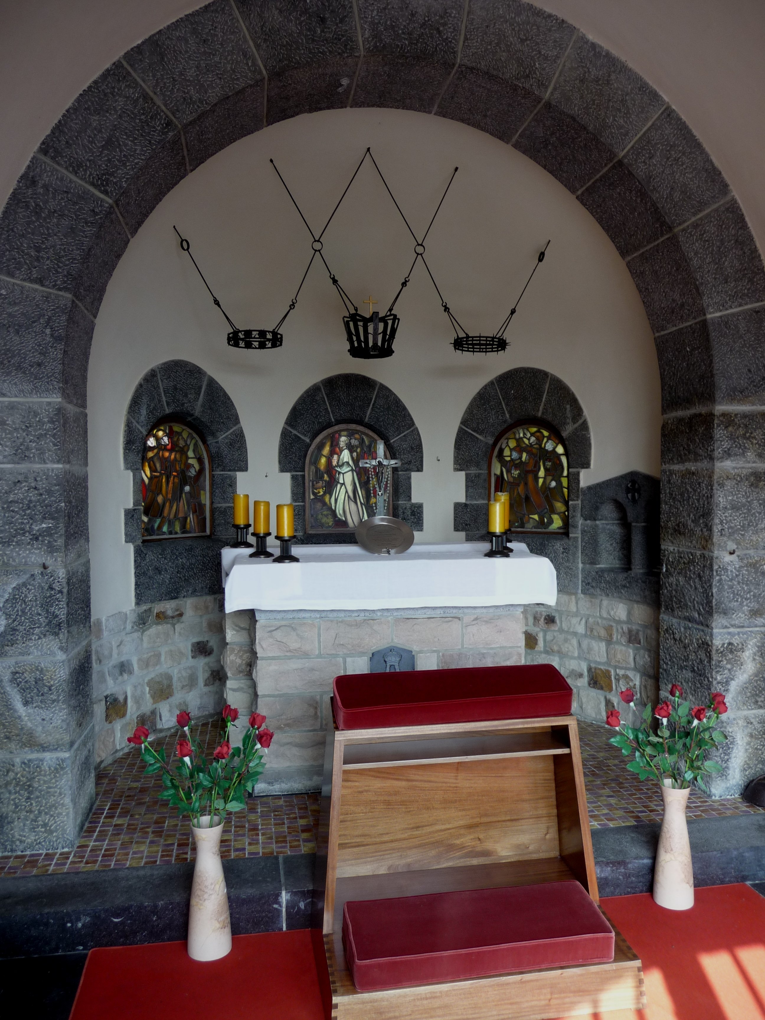 Astrid-Kapelle in Küssnacht am Rigi (Schweiz)